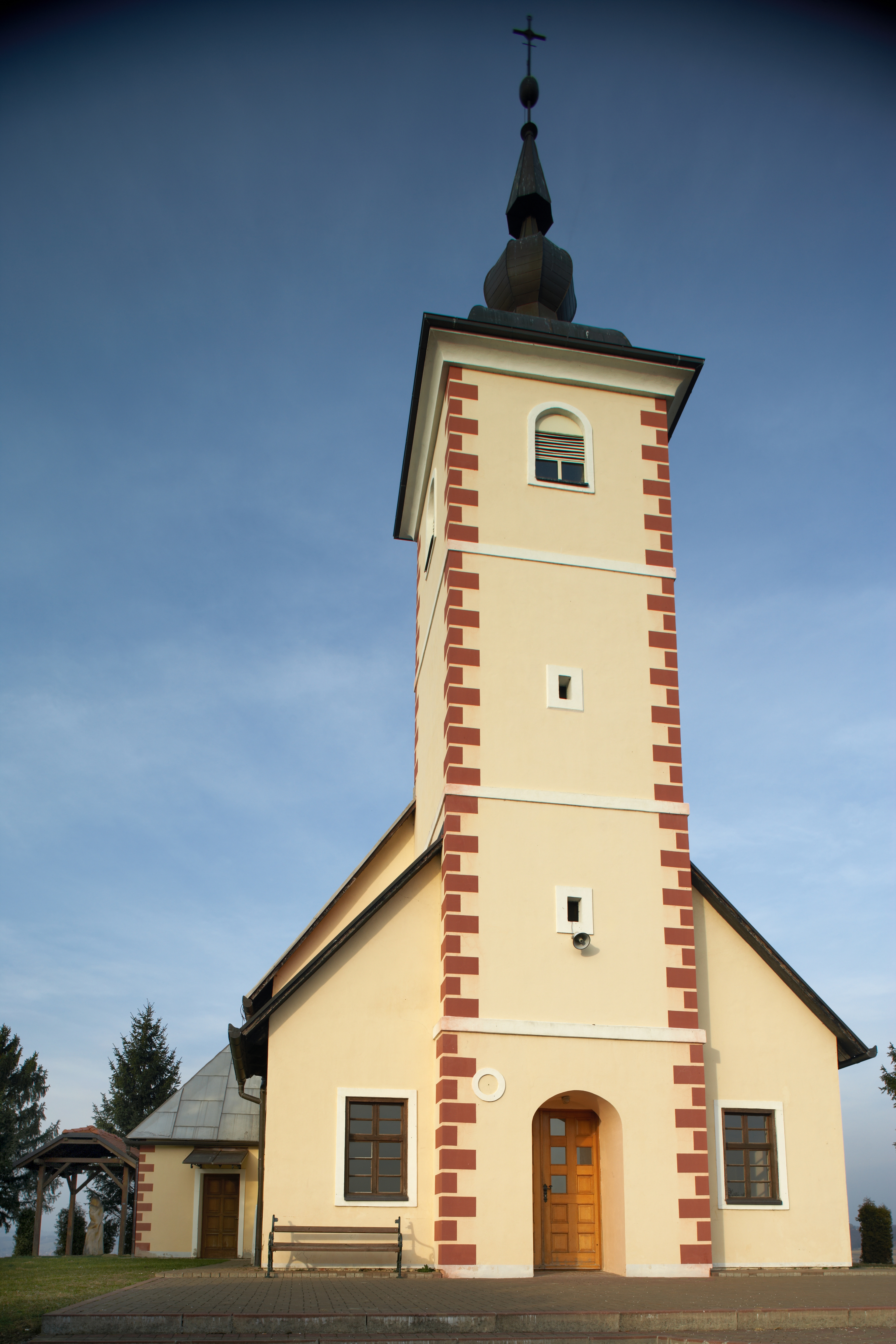 Crkva Sv. Antuna u Grabrovcu.